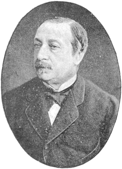 "M. Tribert, sénateur. - (Phot. Ladrey)".